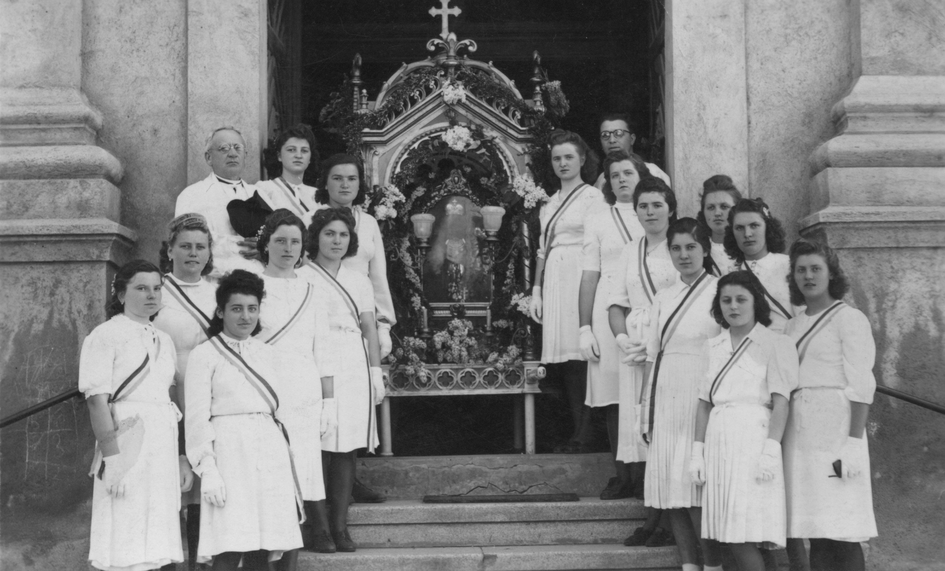 Djevojke sa slikom Majke Božje Snježne ispred crkve sv. Jurja u Petrovaradinu